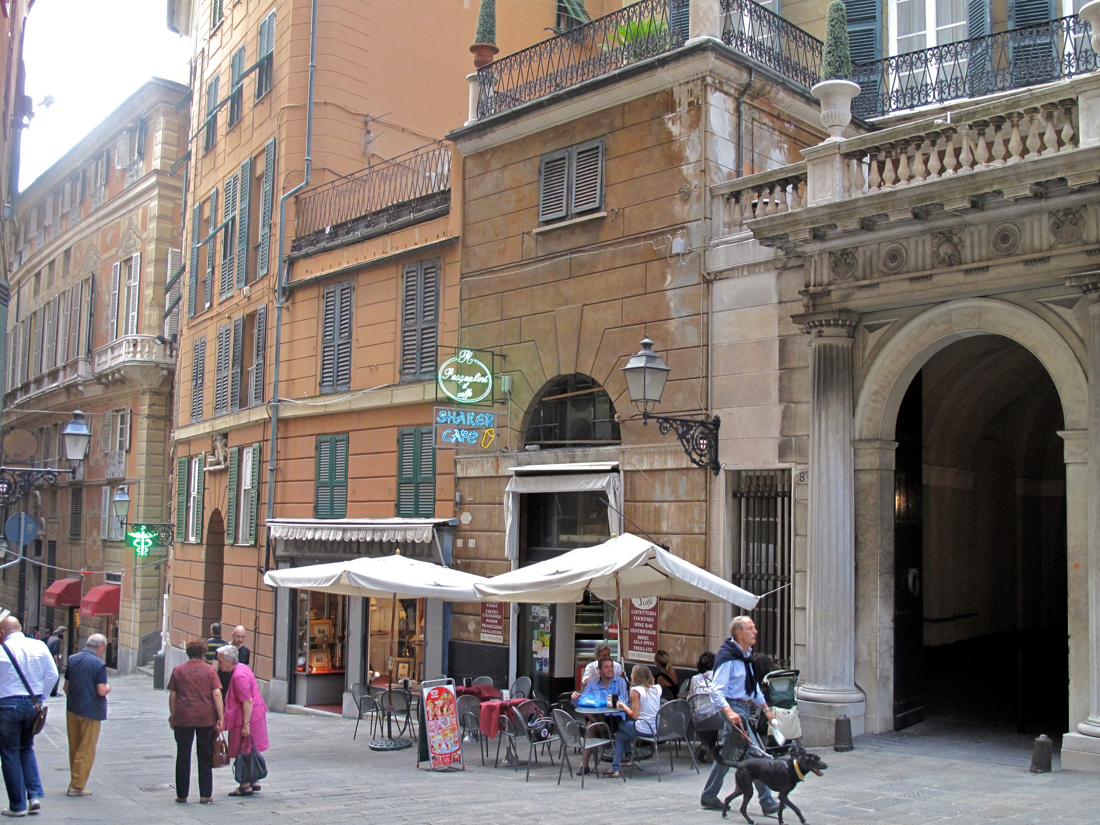 Vacances juillet 2011 en Ligurie